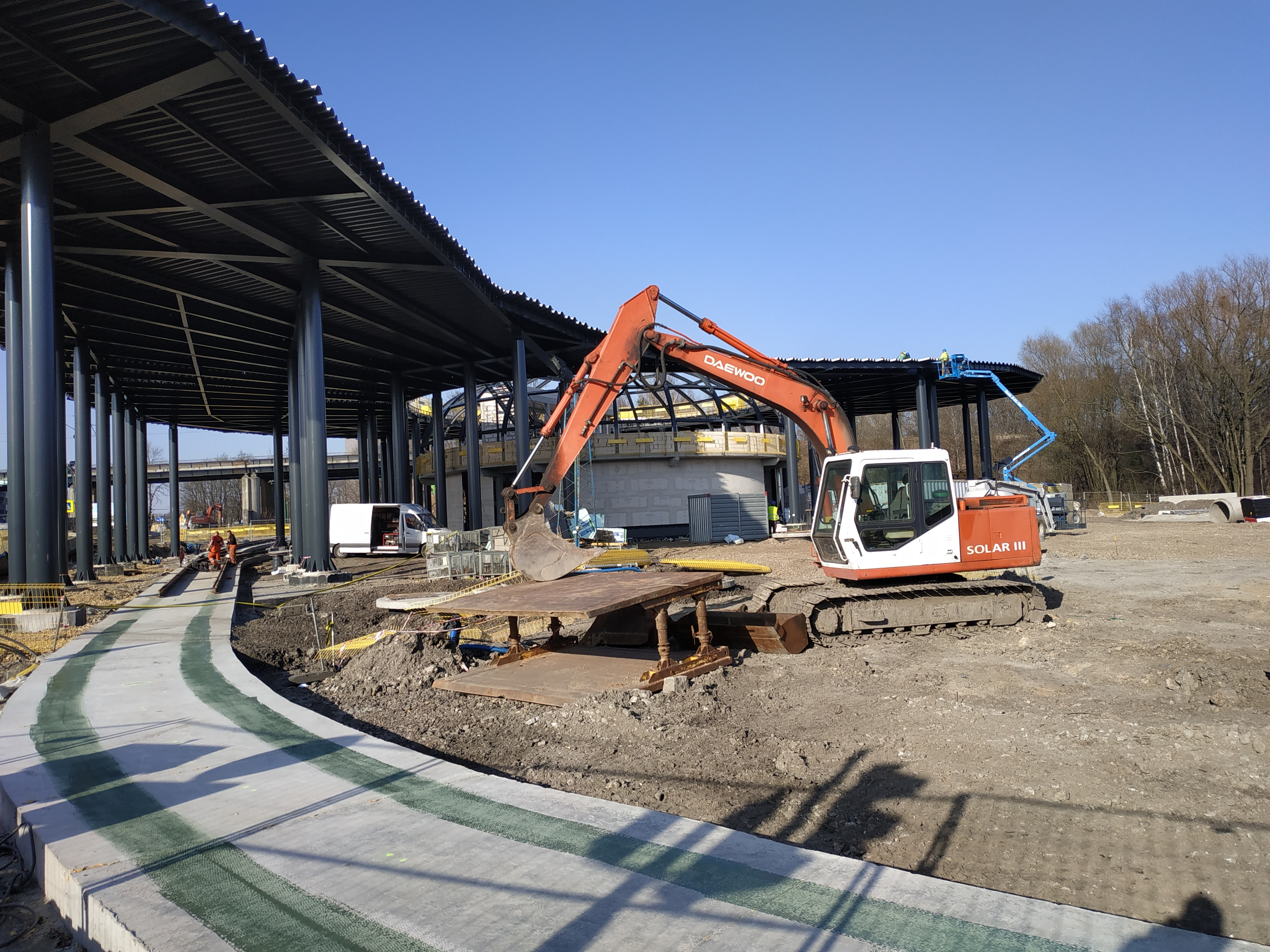 Budowa Centrum Przesiadkowego Brynów